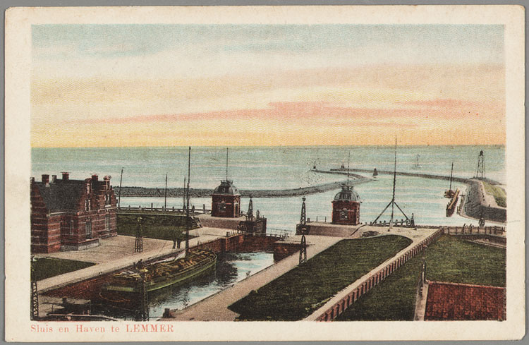 Lemmer, Lemstersluis, haven en sluis met beladen beurtschip